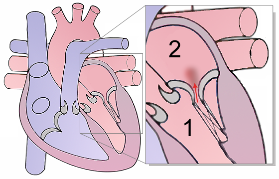 Mitral regurgitation Grade I (scheme)